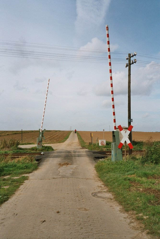 Darstellung einer geöffneten Bahnschranke